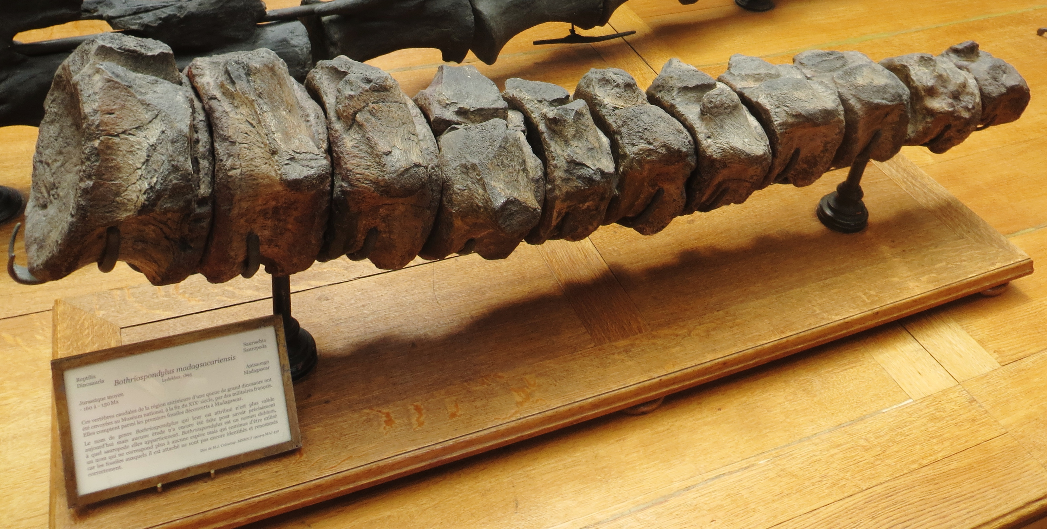 Bothriospondylus fossil